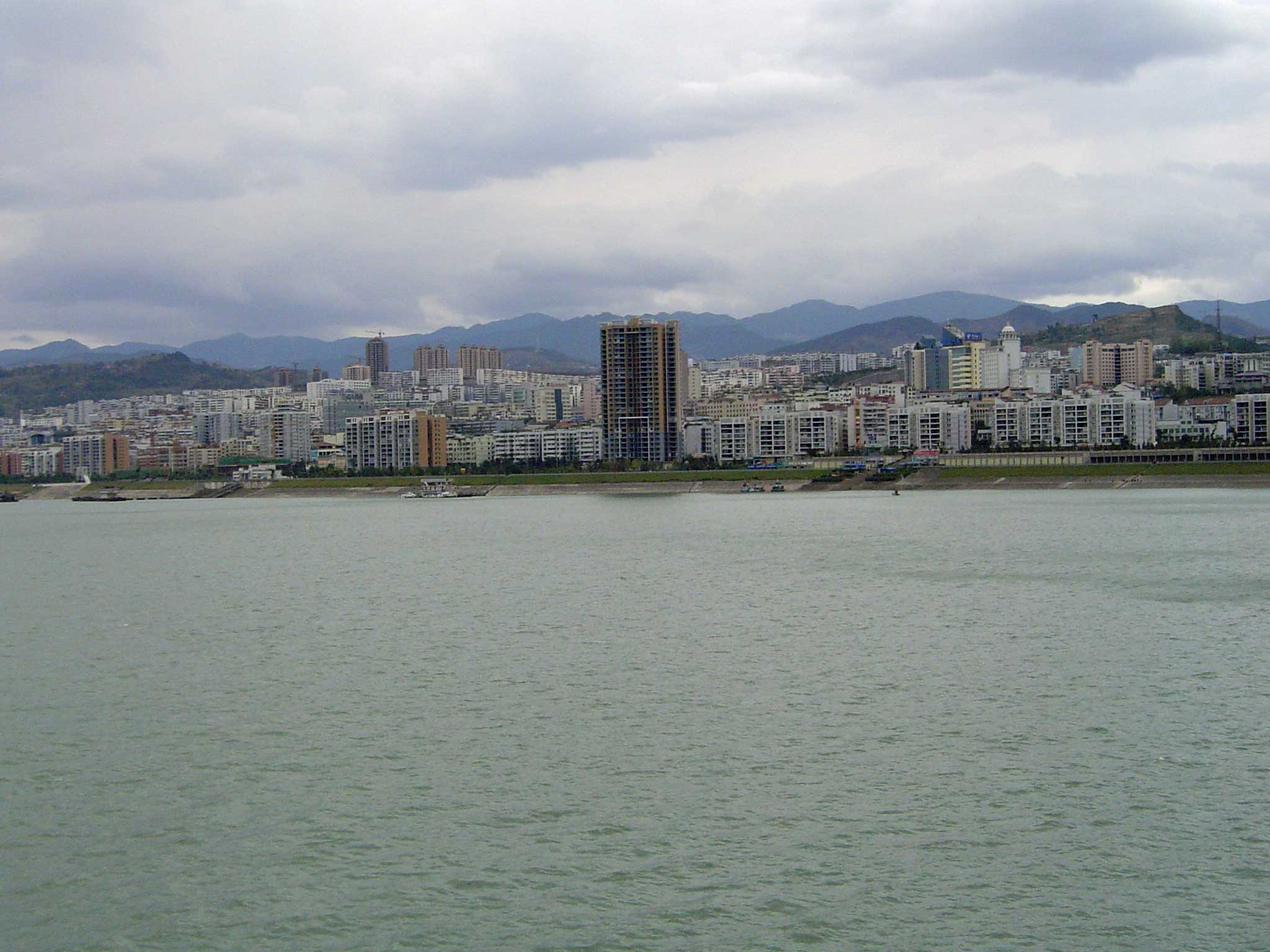 New Fengdu